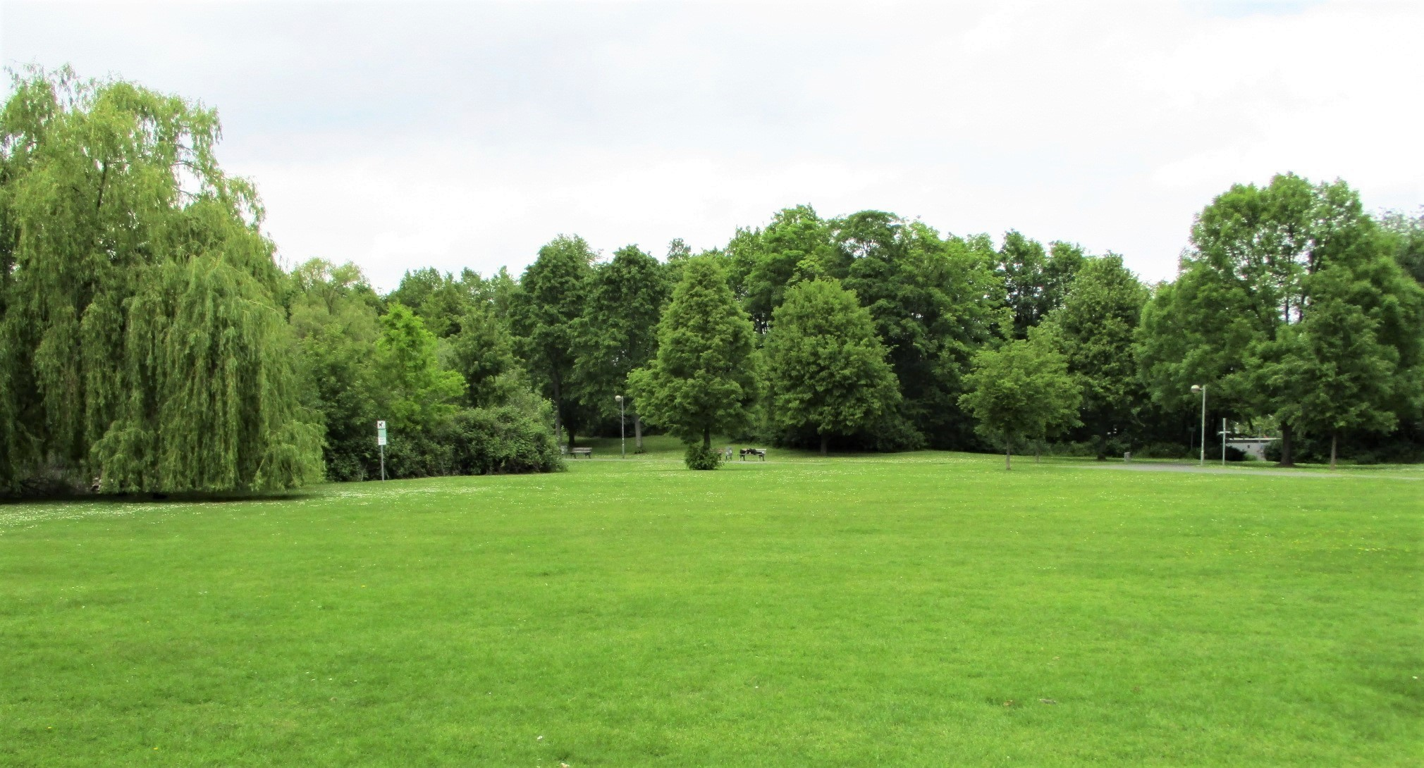 Martin-Luther-King-Park, Frankfurt am Main-Niederursel